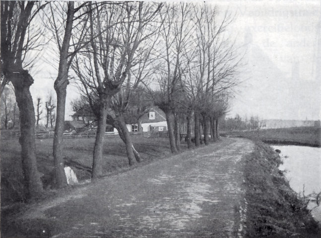 Beukelsdijk eind nl:19e eeuw, fotograaf onbekend Beukelsdijk, Delfshaven (now Rotterdam), 19th century